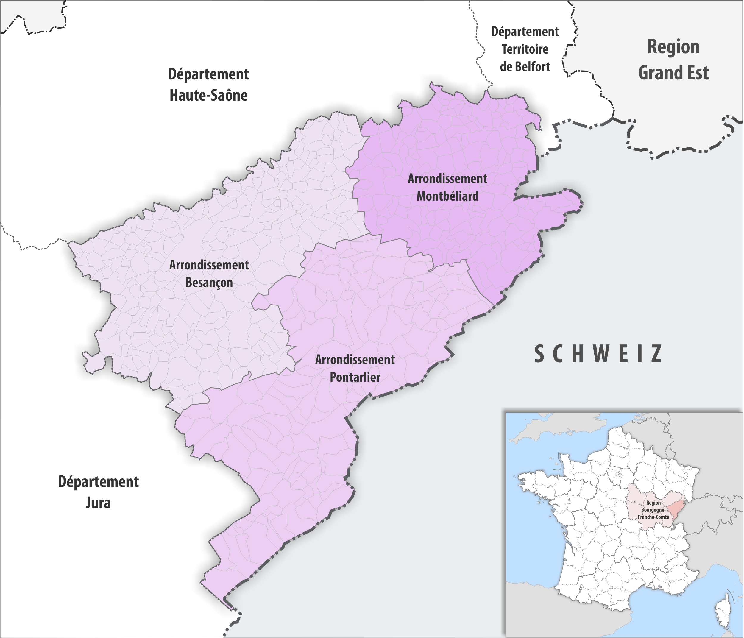 Gemeinden und Arrondissemente im Departement Doubs